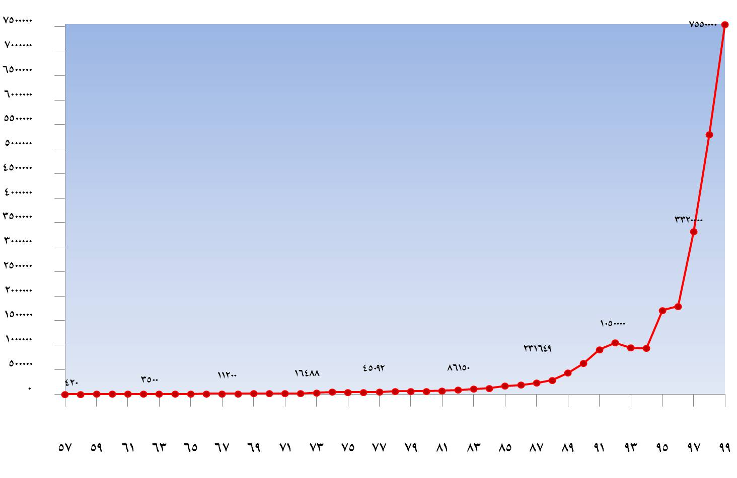 نمودار قیمت سکه بهار آزادی از ۱۳۵۷ تا ۱۳۹۹ خورشیدی